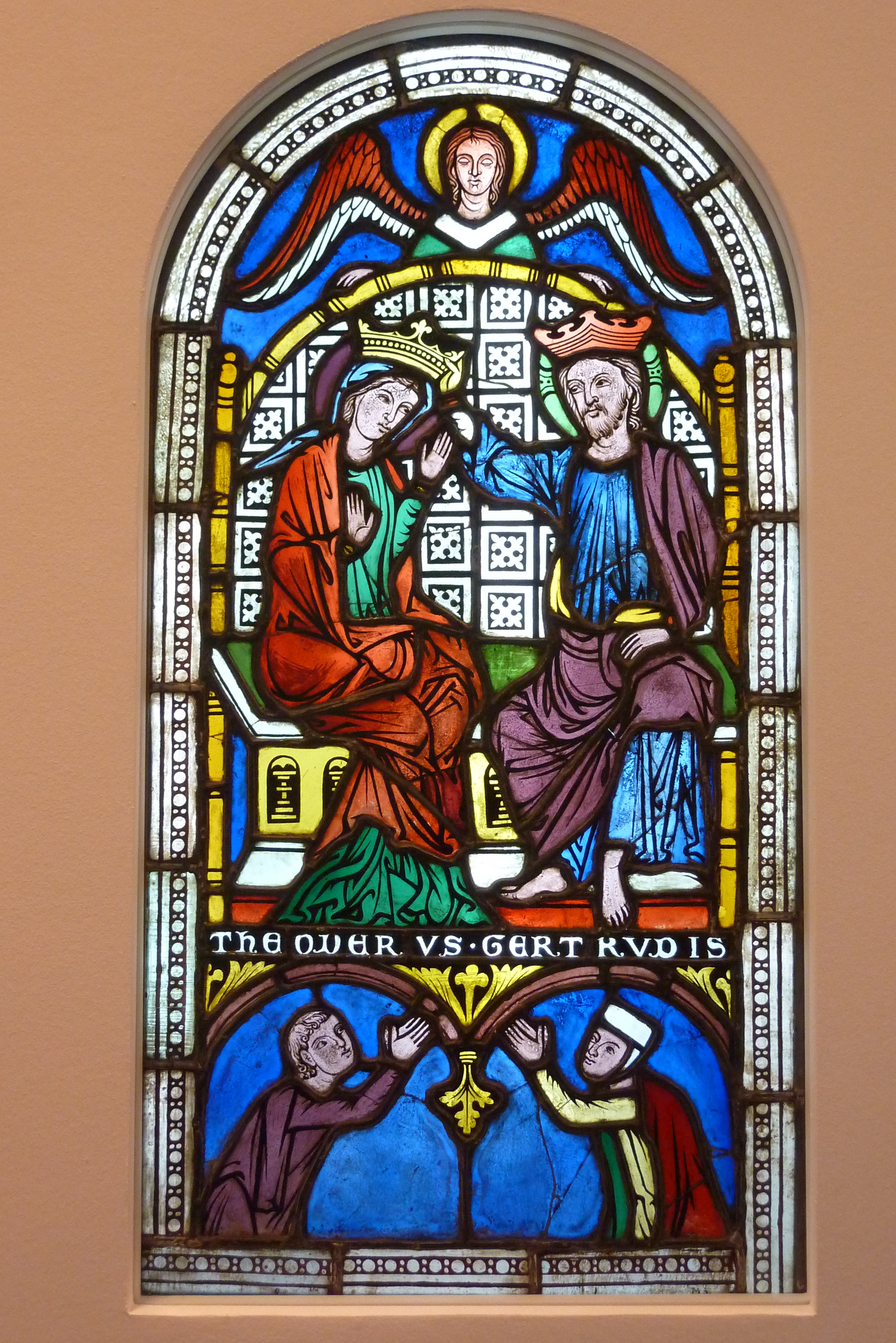 Museum Schnütgen in Köln, Bleiglasfenster mit der Darstellung: Krönung Mariens (Inventar-Nr.: M 3)